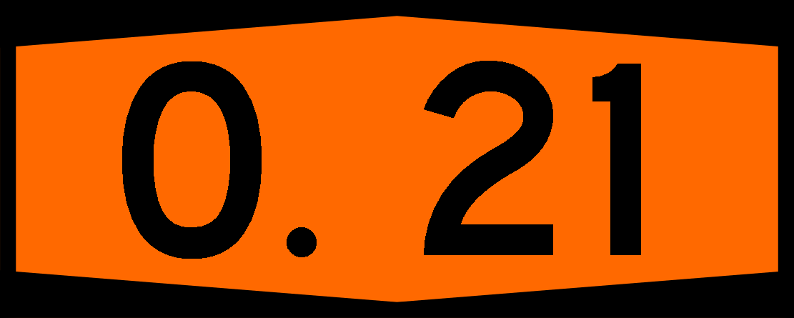 Otoyolu 21